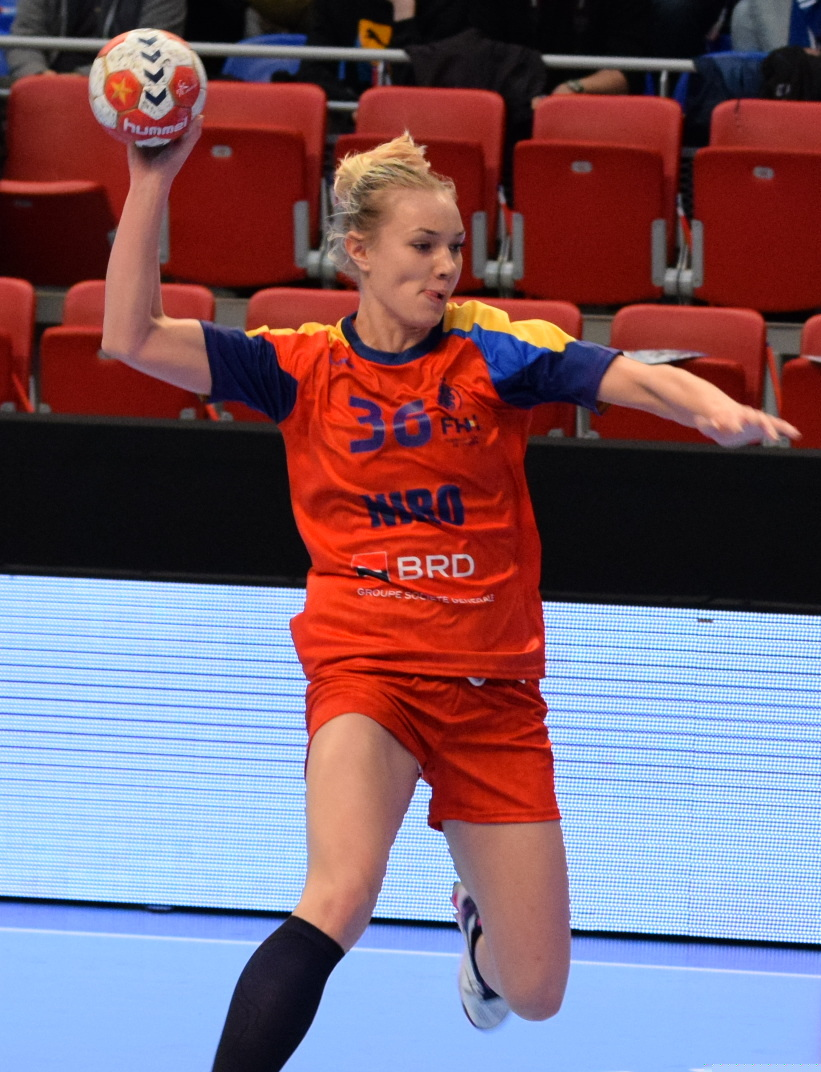 Ana Maria Tănasie Le 29 novembre 2015, lors du match Roumanie / Cuba pour le compte du TIPIFF 2015. Au stade Pierre de Coubertin à Paris.